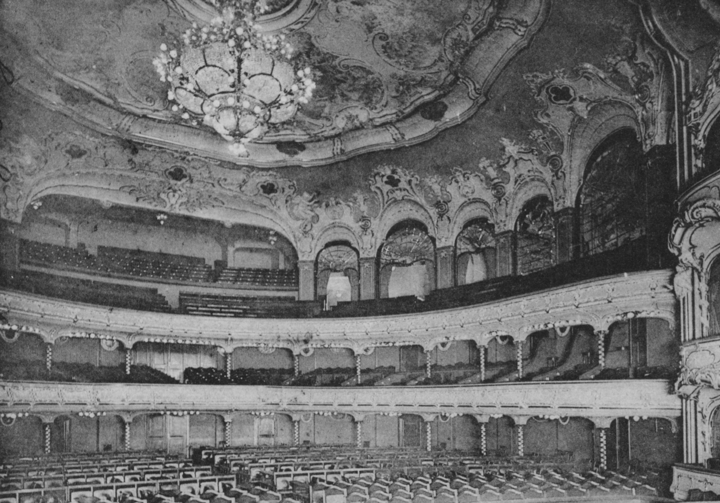 Zentral-Theater Dresden. Publisher: Römmler & Jonas, Dresden